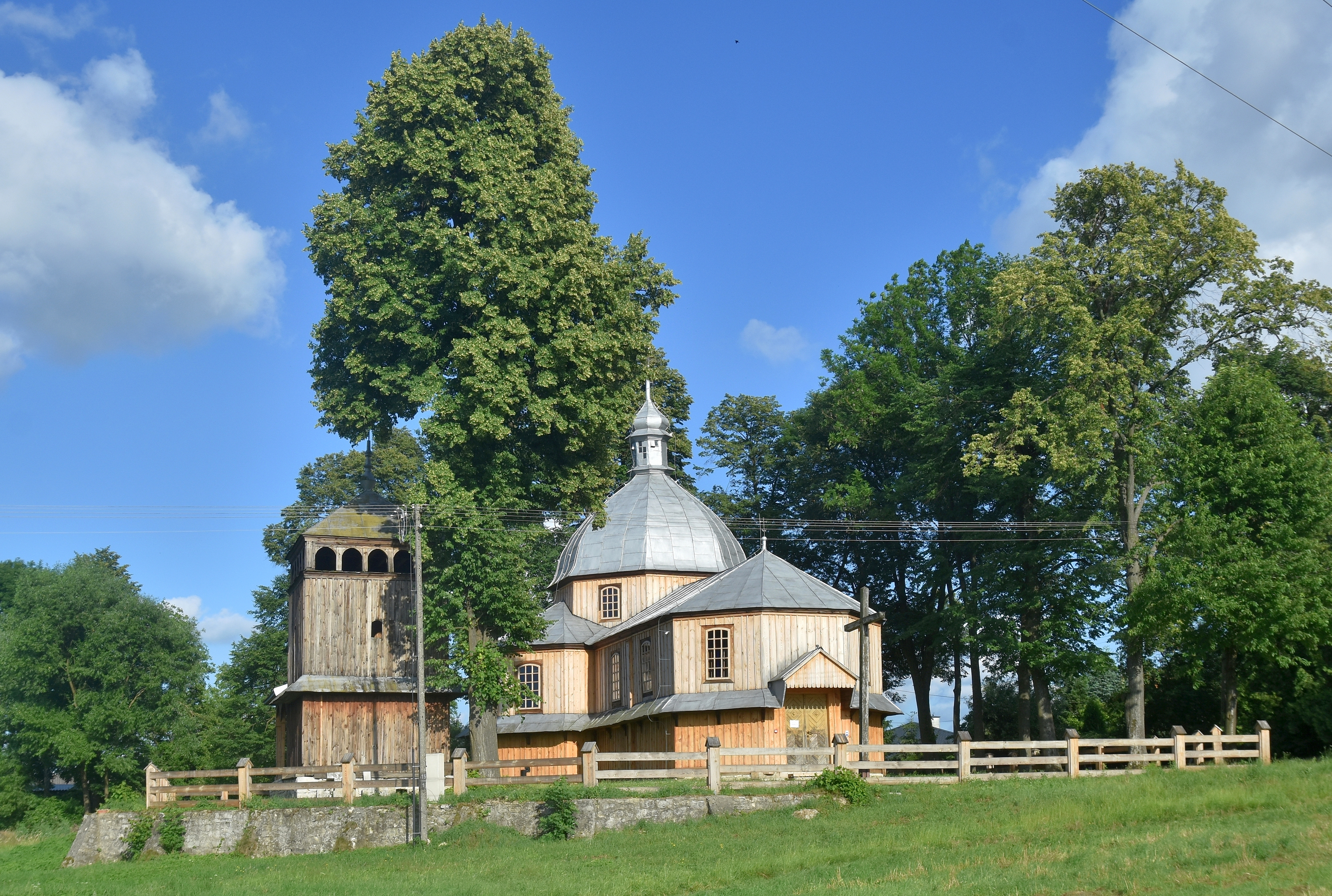 Dachnów, Zespół cerkwi gr.-kat. Podwyższenia Krzyża, ob. kościół rzym.-kat.